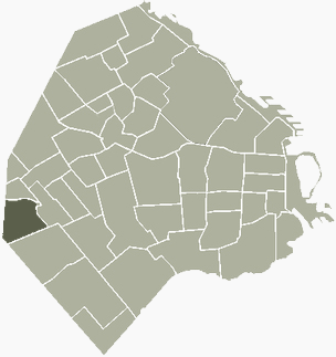 Barrio de Liniers